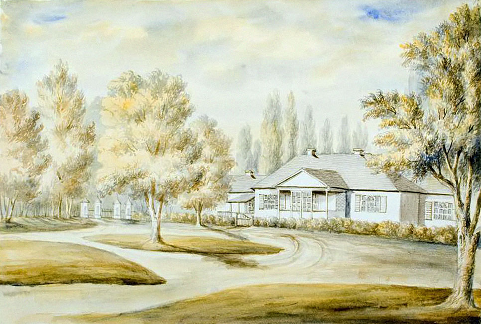 Беларуская (тарашкевіца): Скідзель (Skidziel), сядзіба Чацьвярцінскіх (Čaćviarcinski)